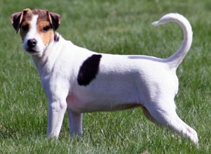 Danish/Swedish farmdog (Dansk-svensk gårdhund)